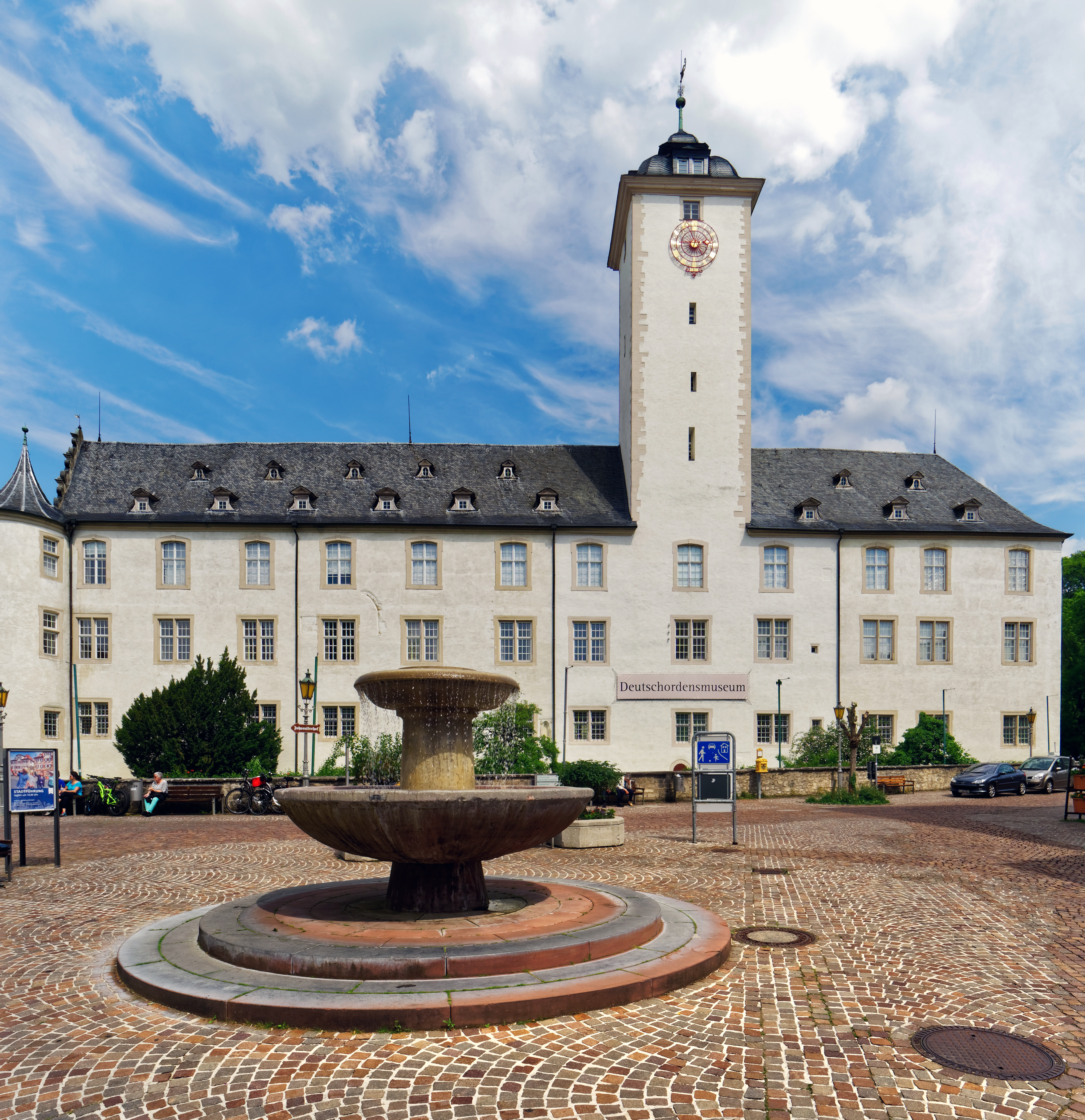 Das Deutschordensmuseum hat seinen Sitz im Schloss Bad Mergentheim.